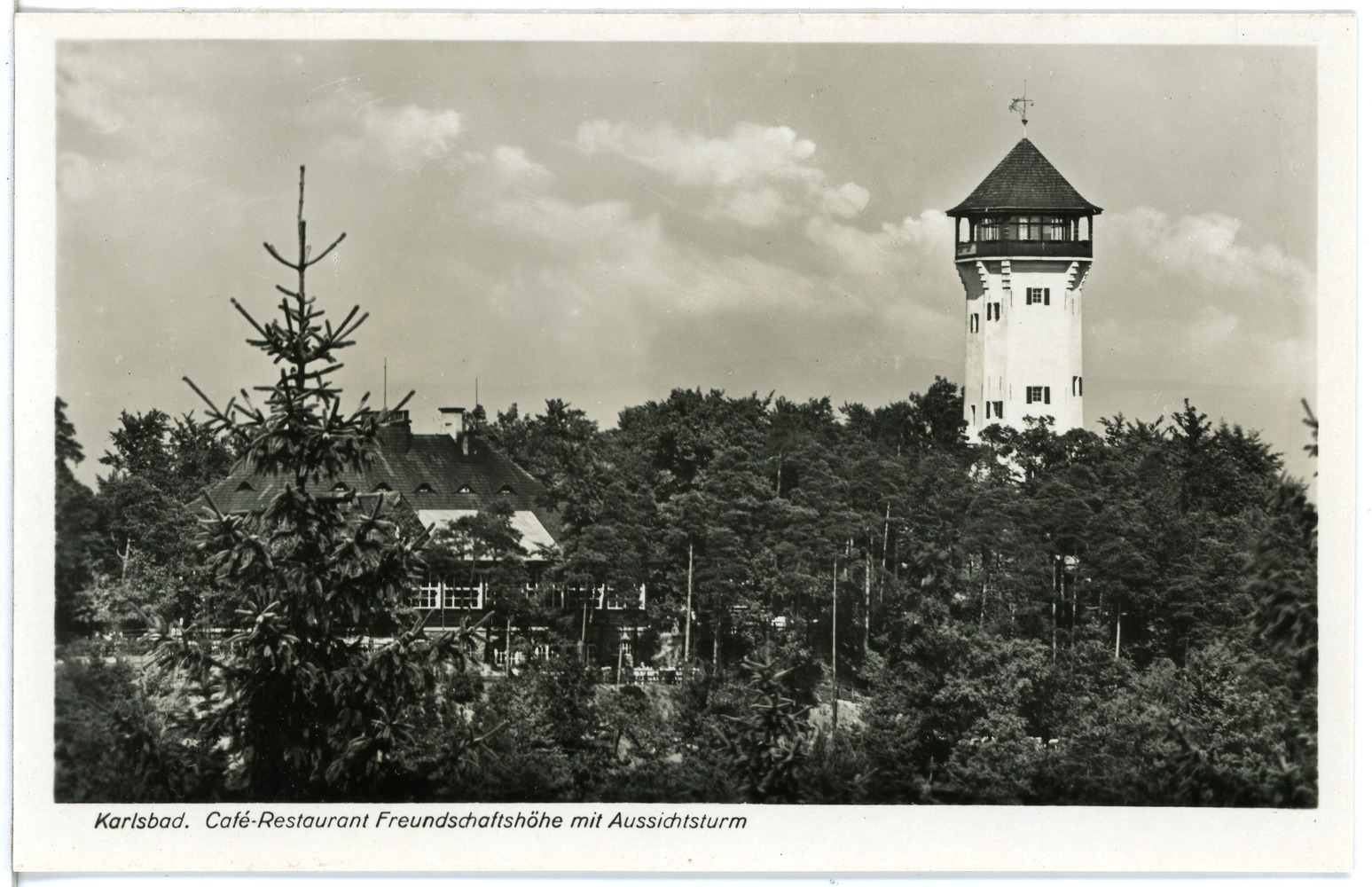 Karlsbad; Cafe Restaurant Freunschafts-Höhe mit Aussichtsturm This postcard is from publisher Brück & Sohn in Meißen ( postcard has a unique number 25573 and is available in a higher resolution at the publisher. This images was uploaded in a cooperation project between Wikipedians and the publisher.